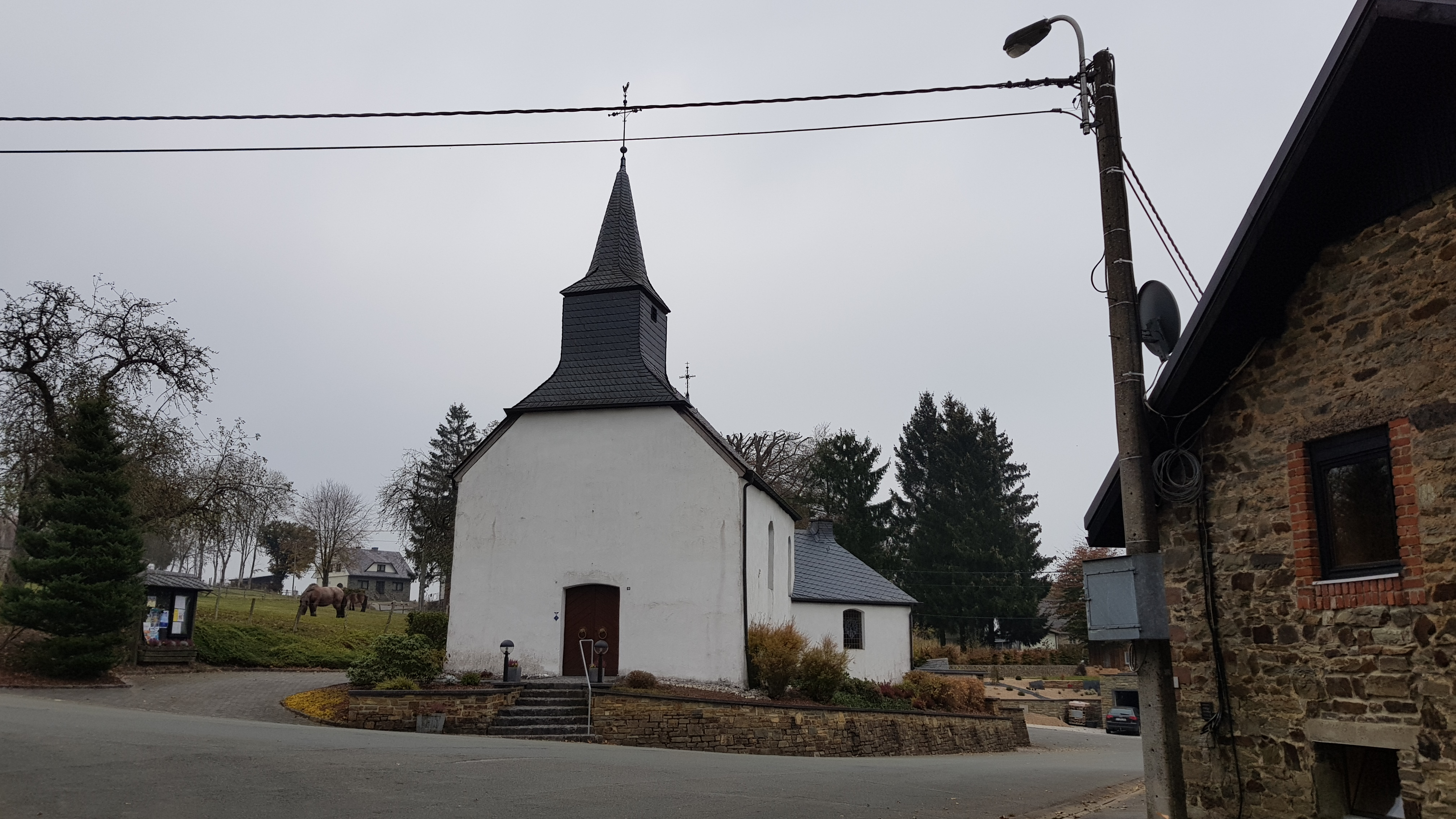 Kapelle St. Sebastian, Eibertingen, Amel, Belgien This photo of immovable heritage has been taken in the Walloon Region